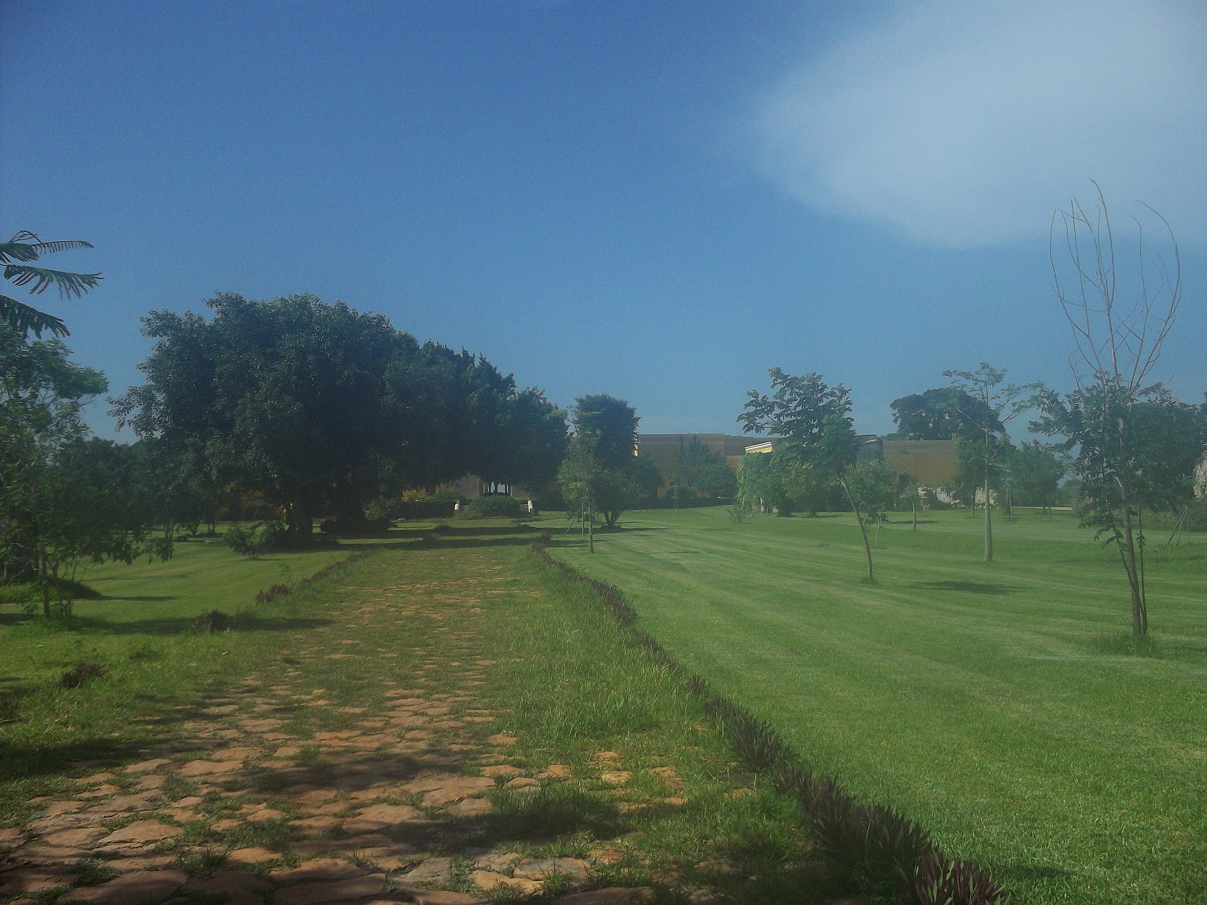 Vista de la hacienda de SantaTeresa.